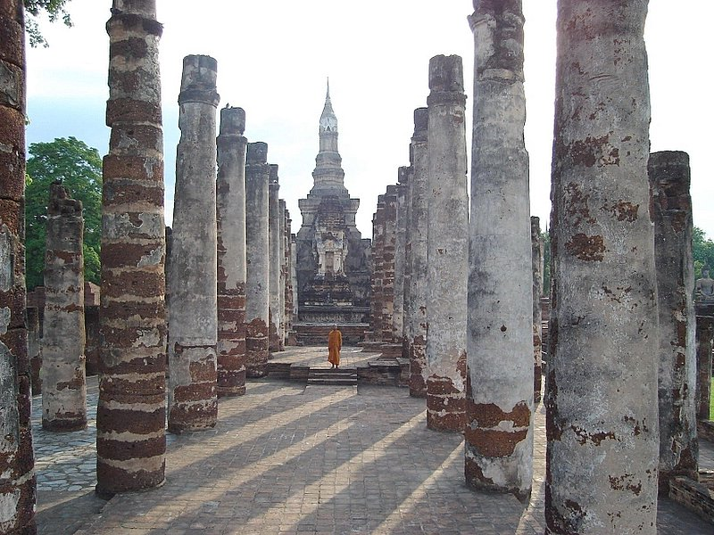 วัดมหาธาตุ อุทยานประวัติศาสตร์สุโขทัย Wat Mahathat .Sukhothai ,Thailand.2006